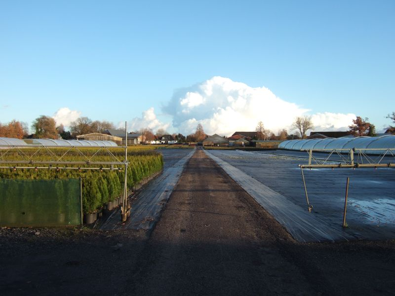 Baumschule in PinnebergDSCF2368